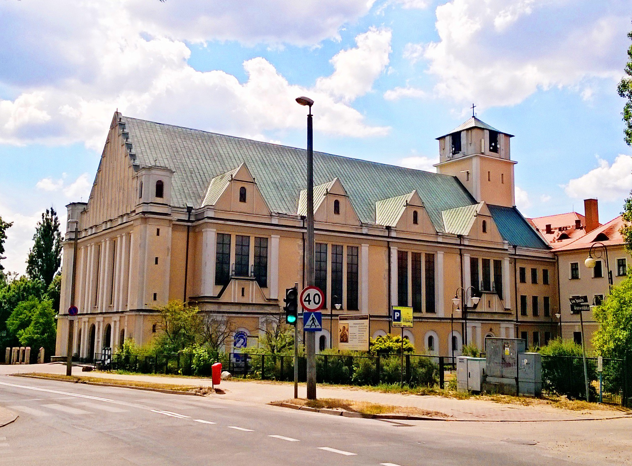 Kościół św. Józefa w Toruniu1